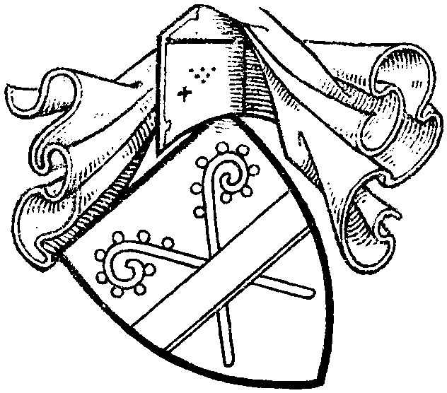 altes Wappen der von Bischopinck